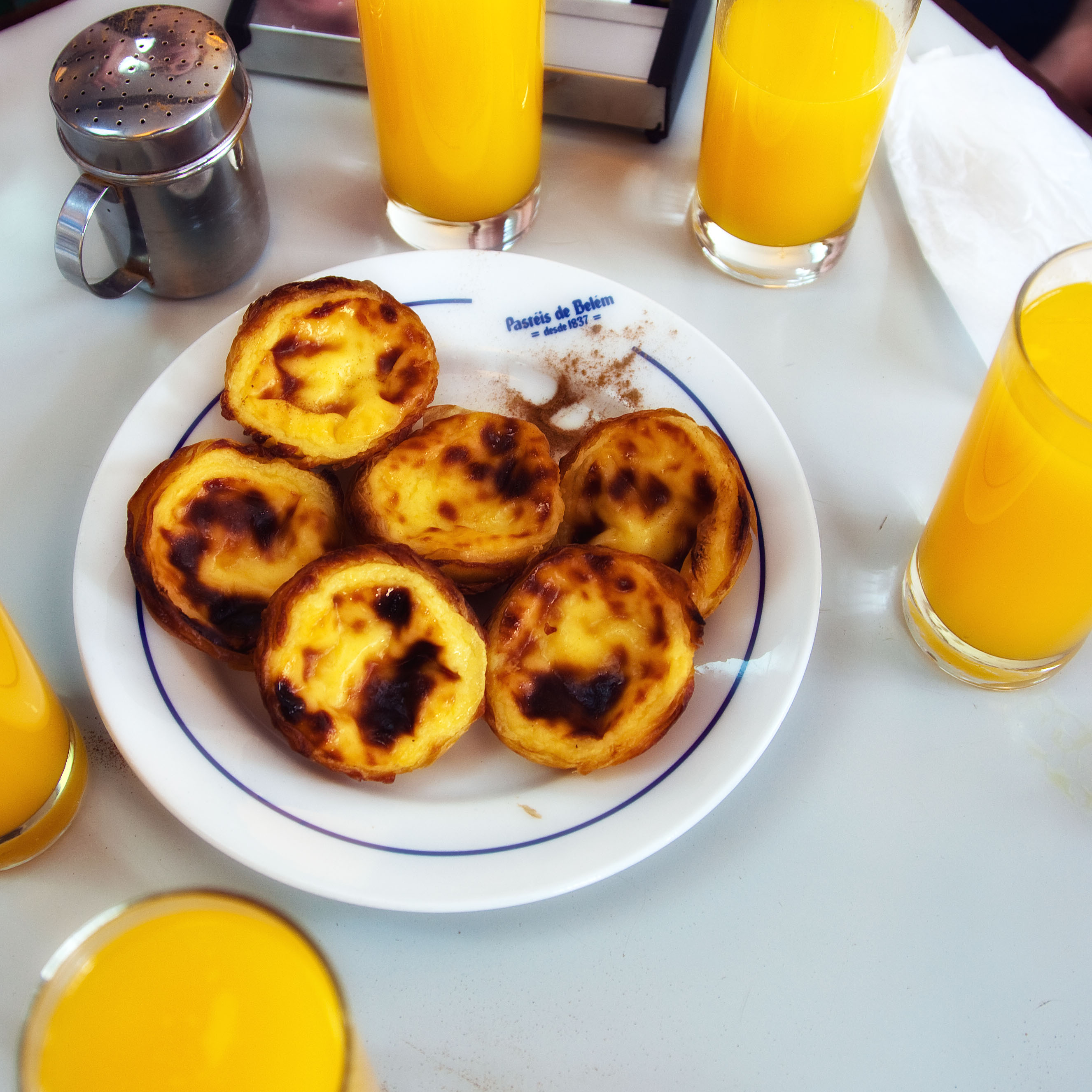 Pasteis de Belem